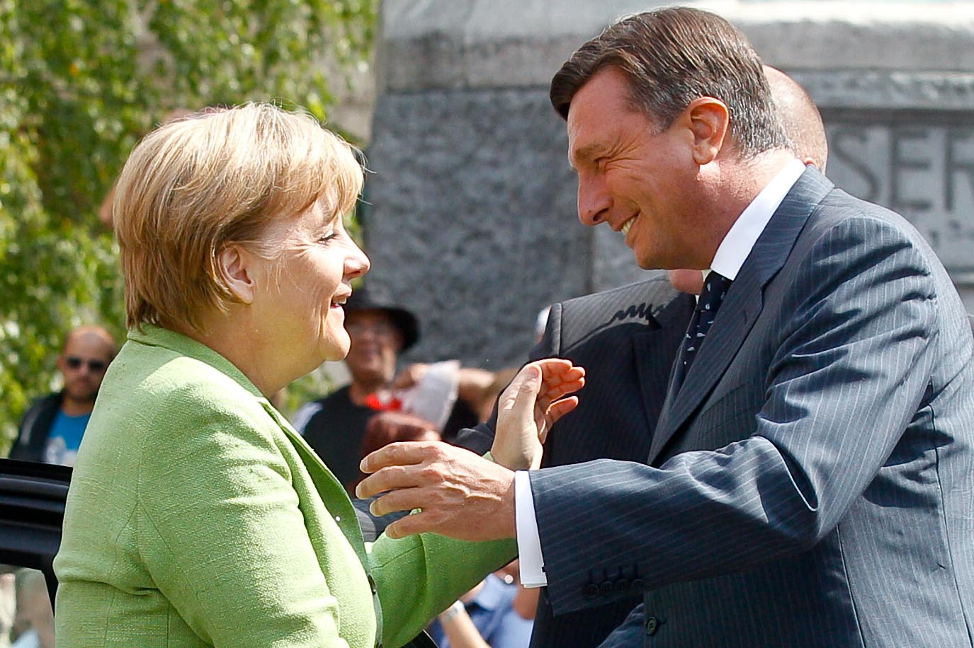 Angela Merkel in Slovenia 2011